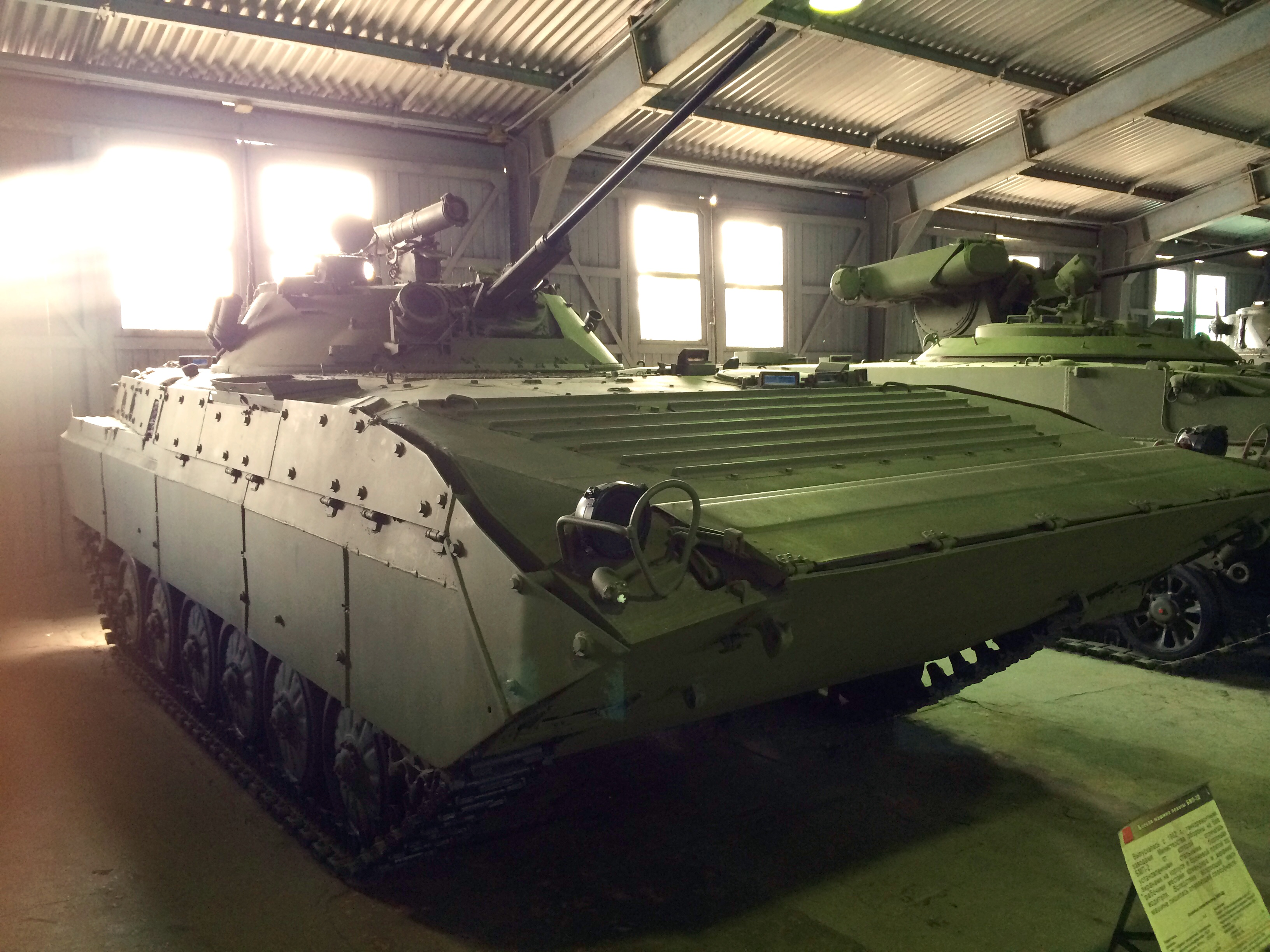 БМП-2Д в Центральном музее бронетанкового вооружения и техники